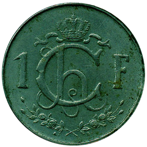 1 franc Luxembourg grande duchesse Charlotte émis en 1960